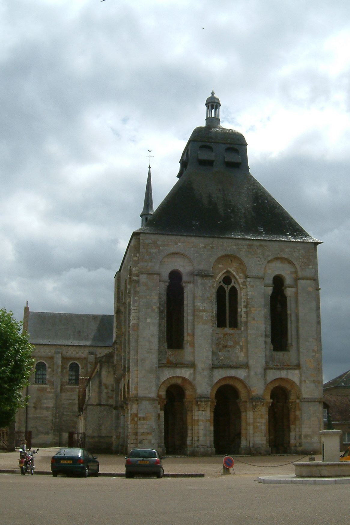 Abbaye de Saint-Benoît-sur-Loire, FRANCE